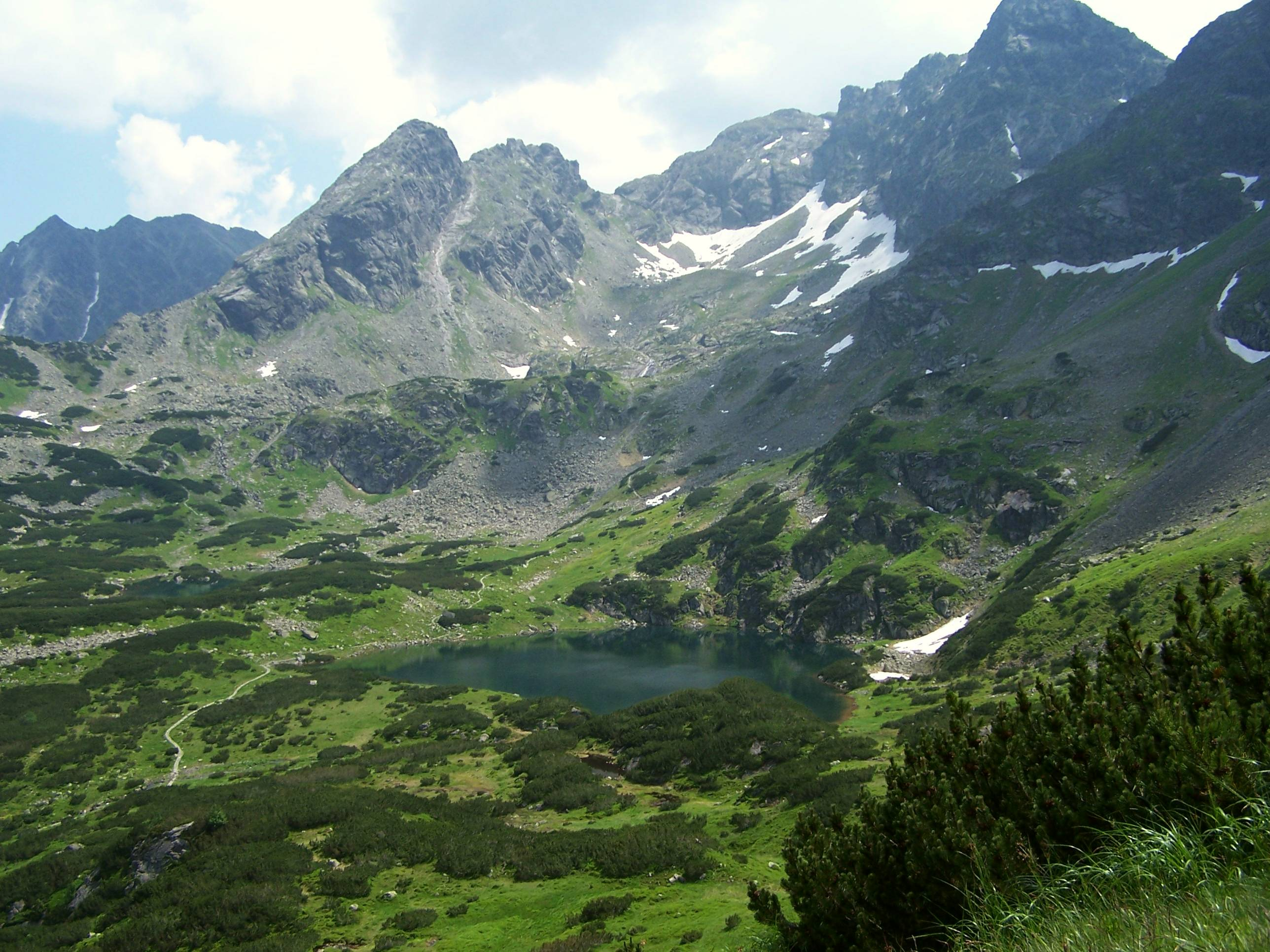 Dolina Gąsienicowa (Tatra Mountains)